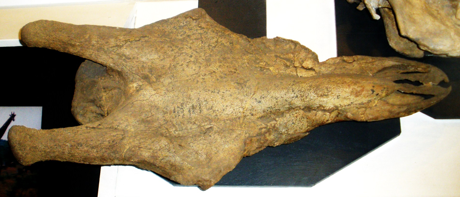 Fossil of Giraffa, an extinct mammal -- Took the photo at Natural History Museum, London